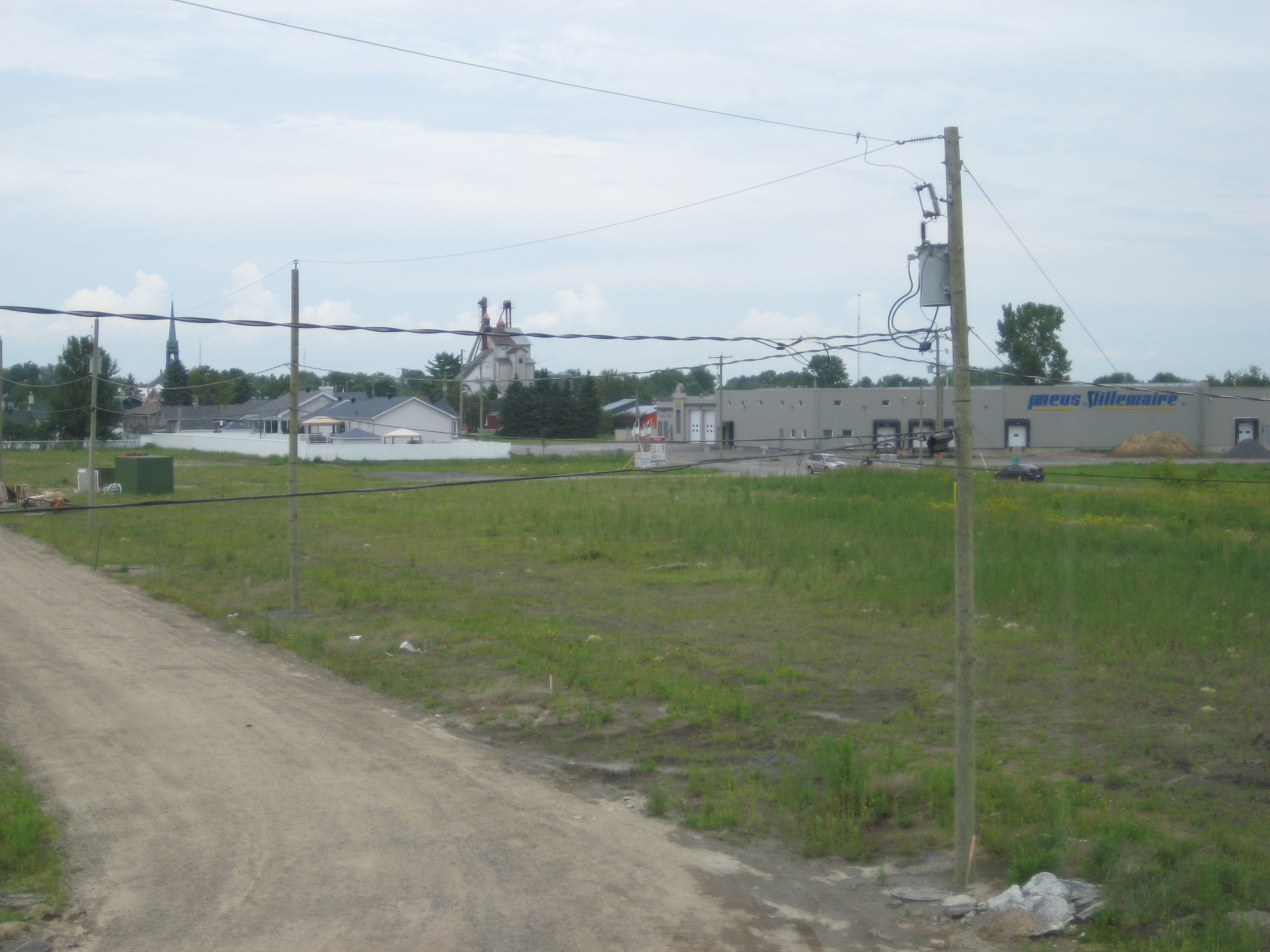 vue de Saint-Esprit, au Québec